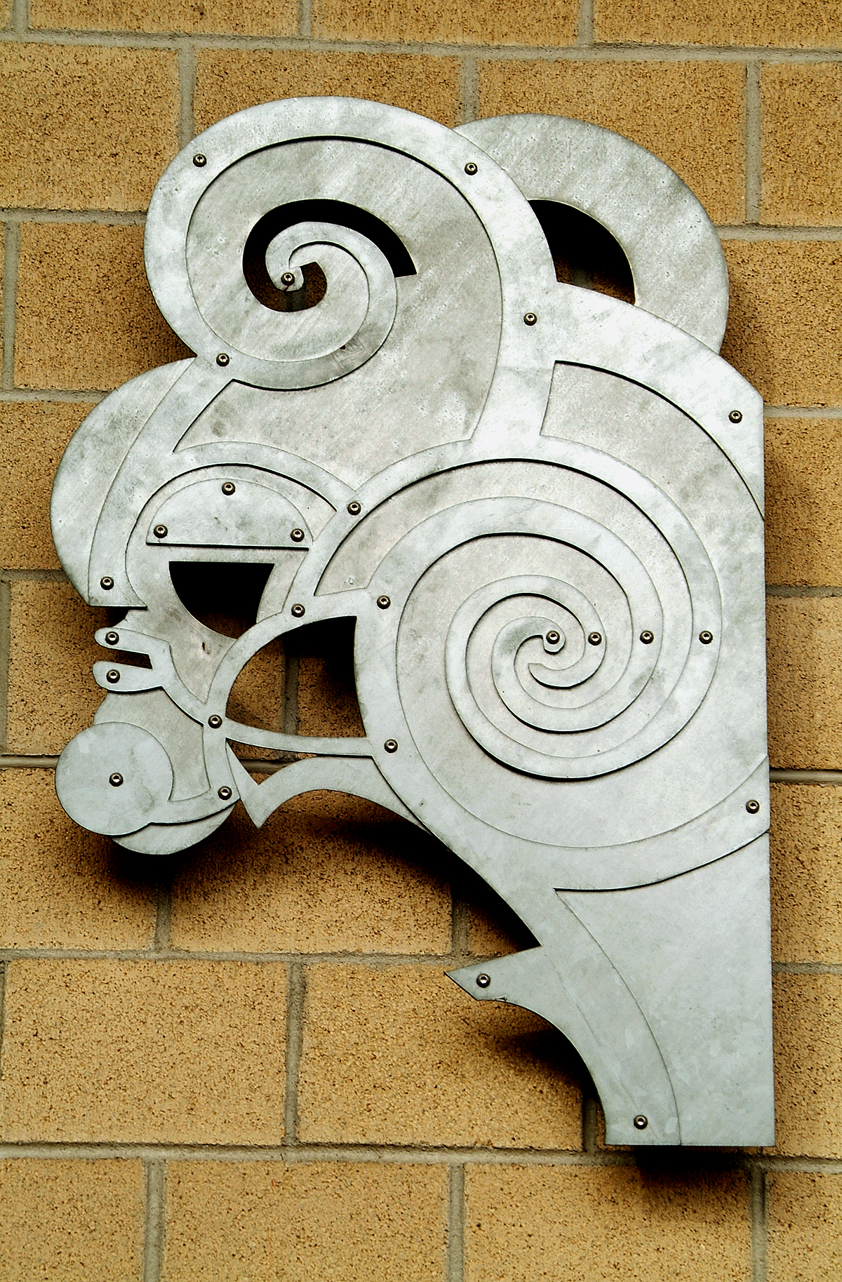 Diese Windsbraut des Bildhauers WP Eberhard Eggers ist nur ein Fragment. Der Bildhauer schuf es 2003 in Kampen auf Sylt …